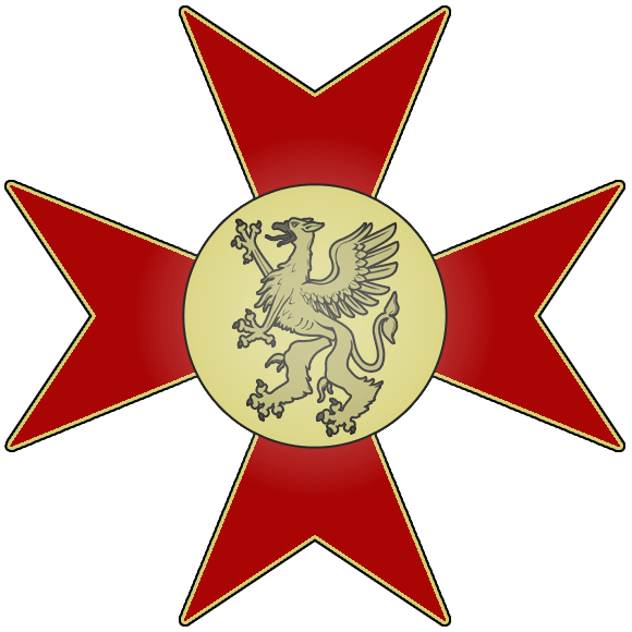 Medaglia dell'ordine del grifone